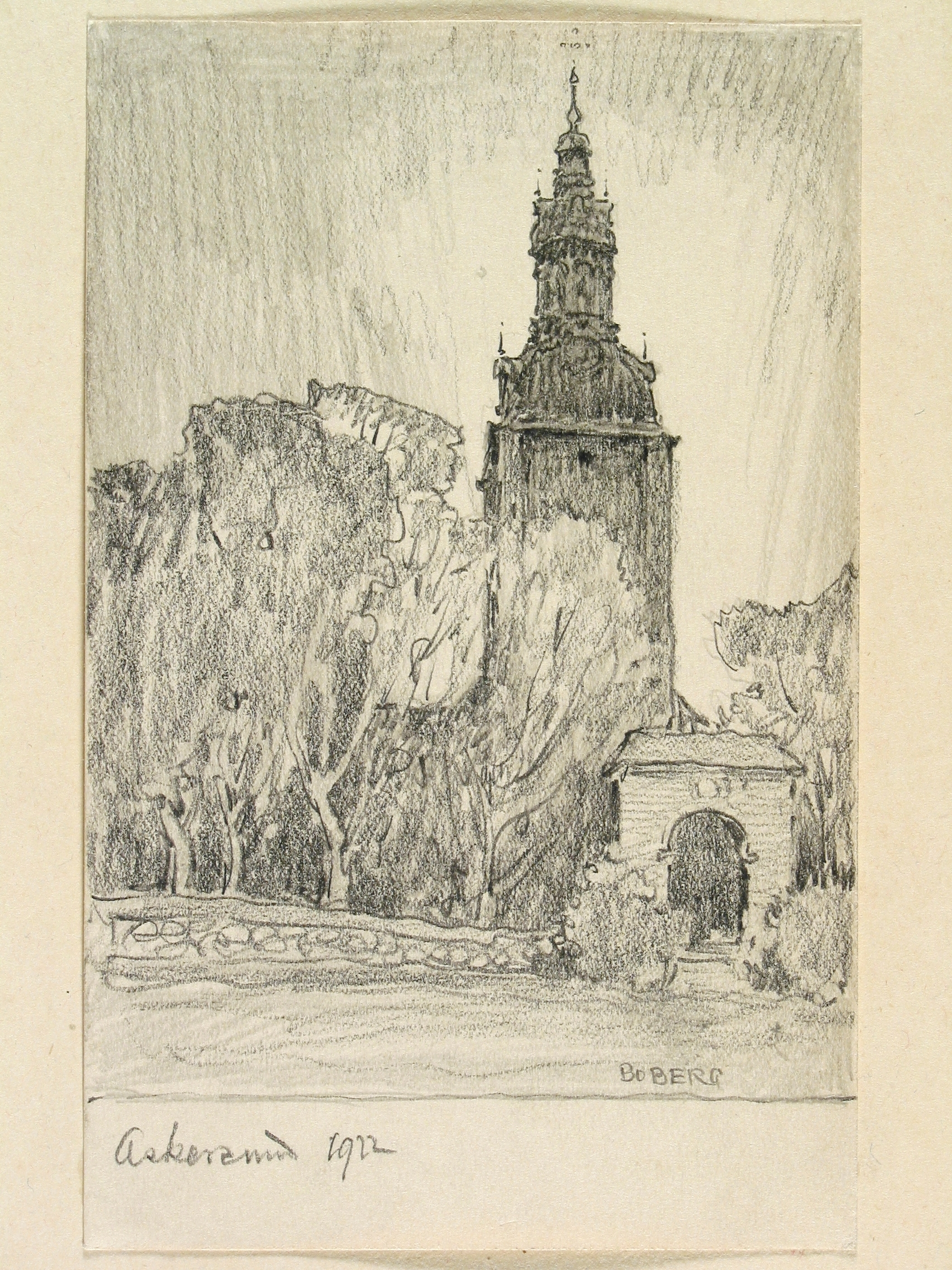 Askersunds landskyrka. Teckning av Ferdinand Boberg Depicted place: Landskyrkan (Ortnamn därutöver), Askersund Municipality (Q509501)